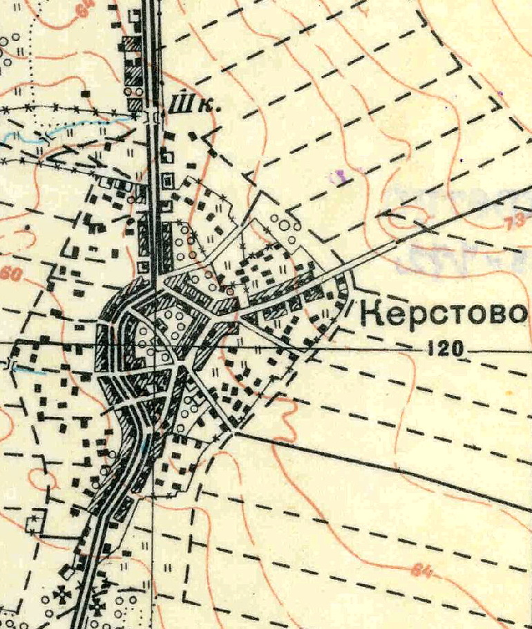 Топографическая карта Ленинградской области, квадрат О-35-22-Г-а (Керстово), деревня Керстово.